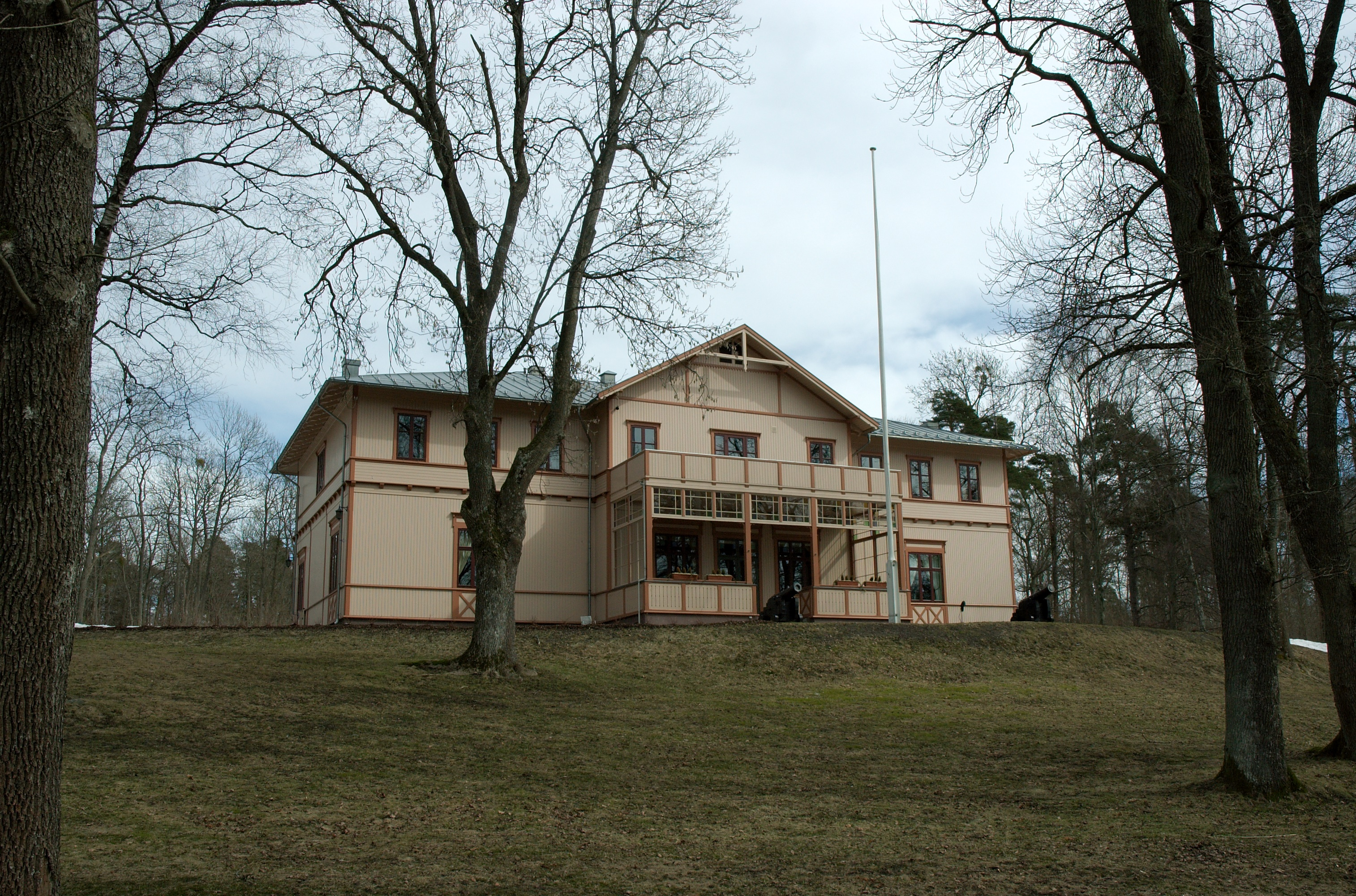 Horten Sjømilitære Samfund